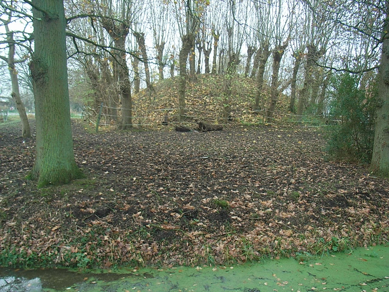 Jedutenhügel in Golzwarden-Schmalenfleth, Ortsteil von Brake (Unterweser); Ansicht von Osten